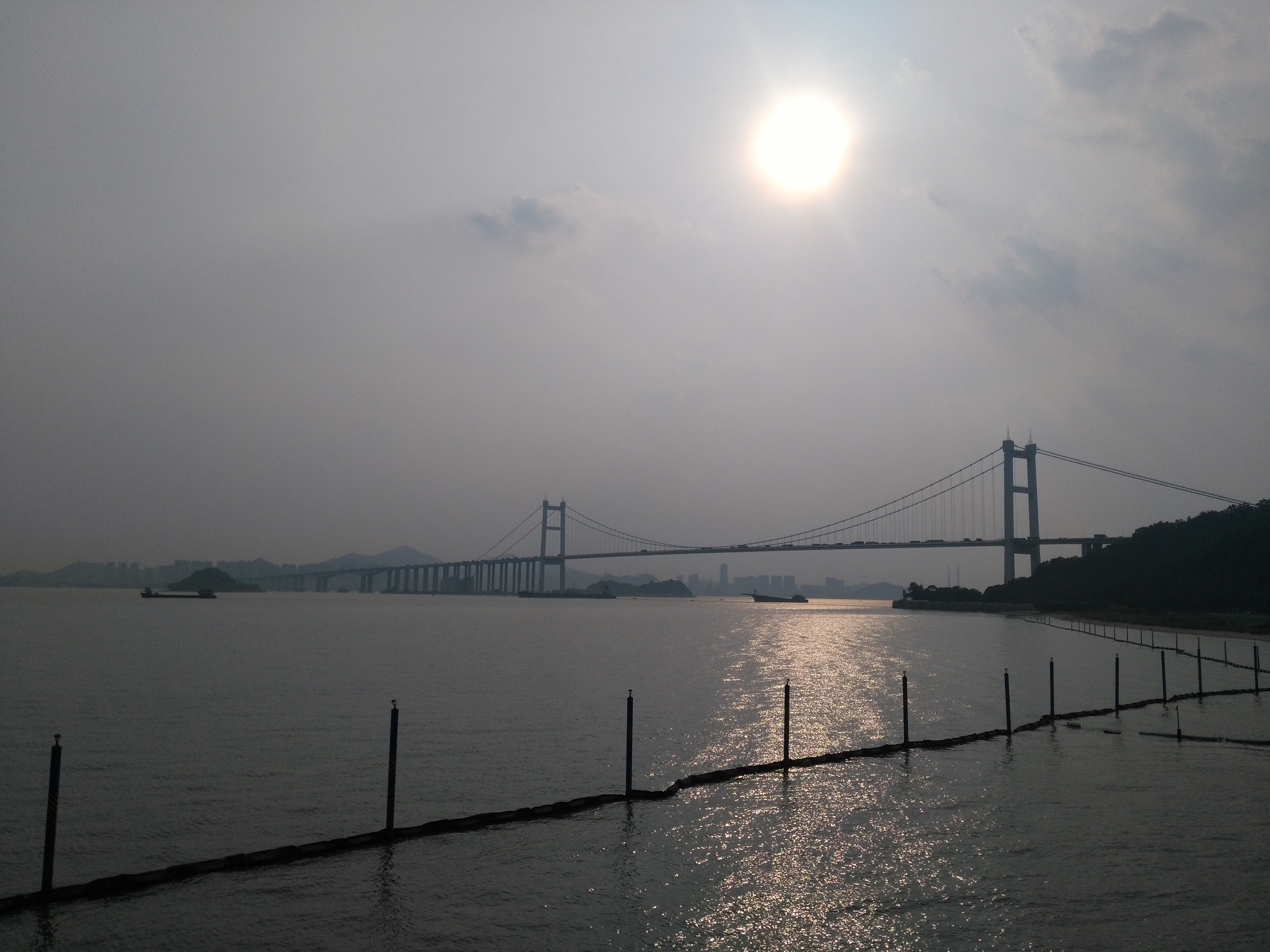 虎门大桥远景图